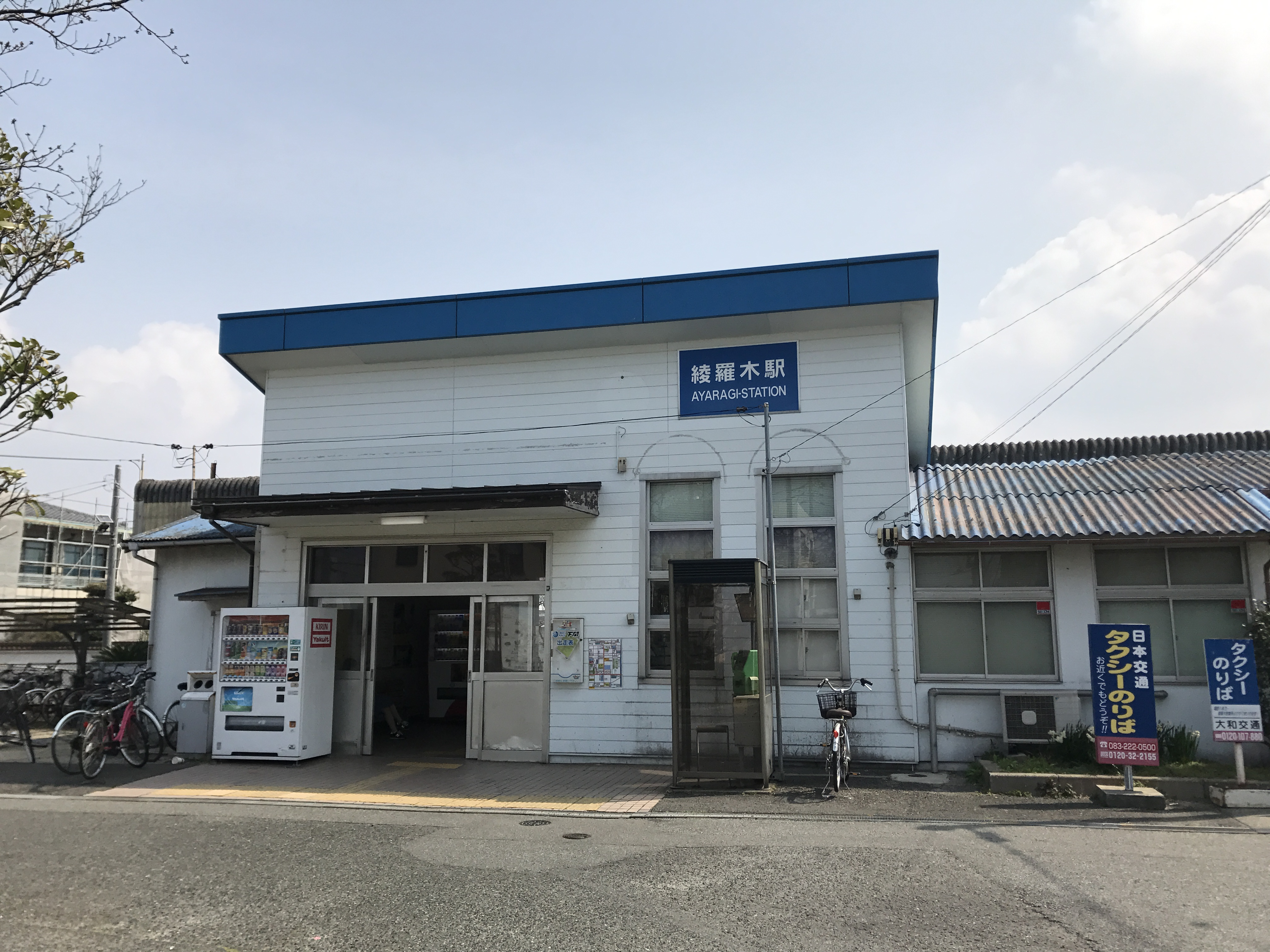 綾羅木駅駅舎